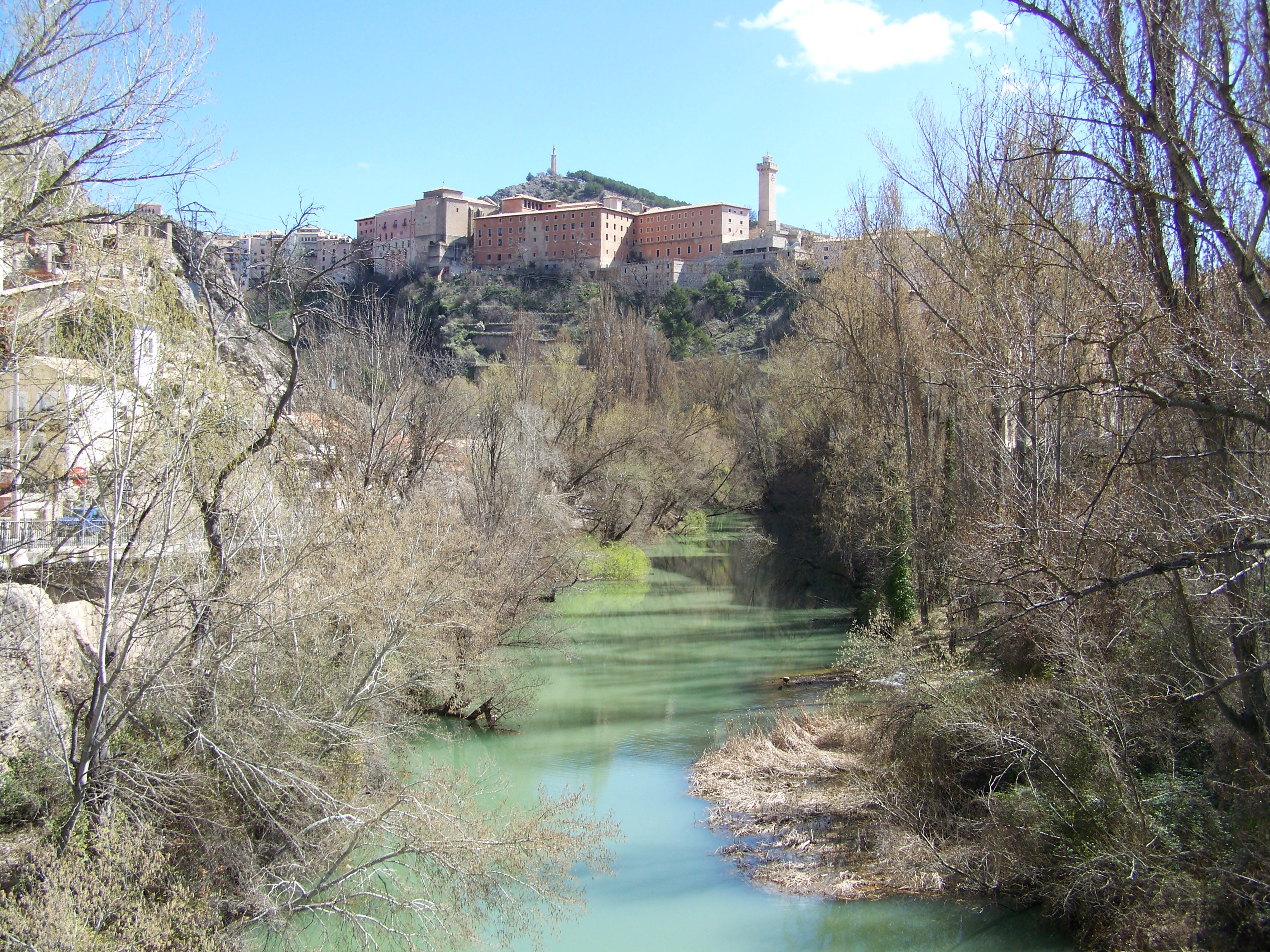 Cuenca: Río Júcar / Júcar river